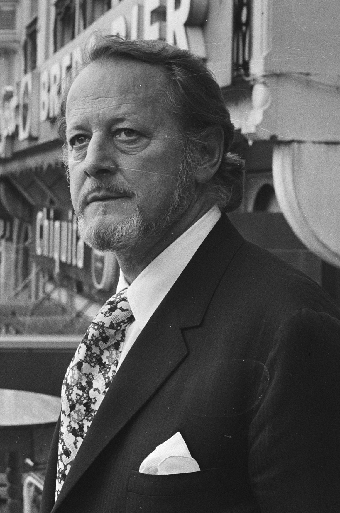 Collectie / Archief : Fotocollectie Anefo Reportage / Serie : [ onbekend ] Beschrijving : Amerikaanse filmregisseur Ralph Nelson in Amsterdam; Ralph Nelson Datum : 7 december 1970 Locatie : Amsterdam, Noord-Holland Trefwoorden : filmregisseurs Fotograaf : Peters, Hans / Anefo Auteursrechthebbende : Nationaal Archief Materiaalsoort : Negatief (zwart/wit) Nummer archiefinventaris : bekijk toegang 2.24.01.05 Bestanddeelnummer : 924-0749